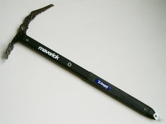 Klim pickel (Klimmateriaal)